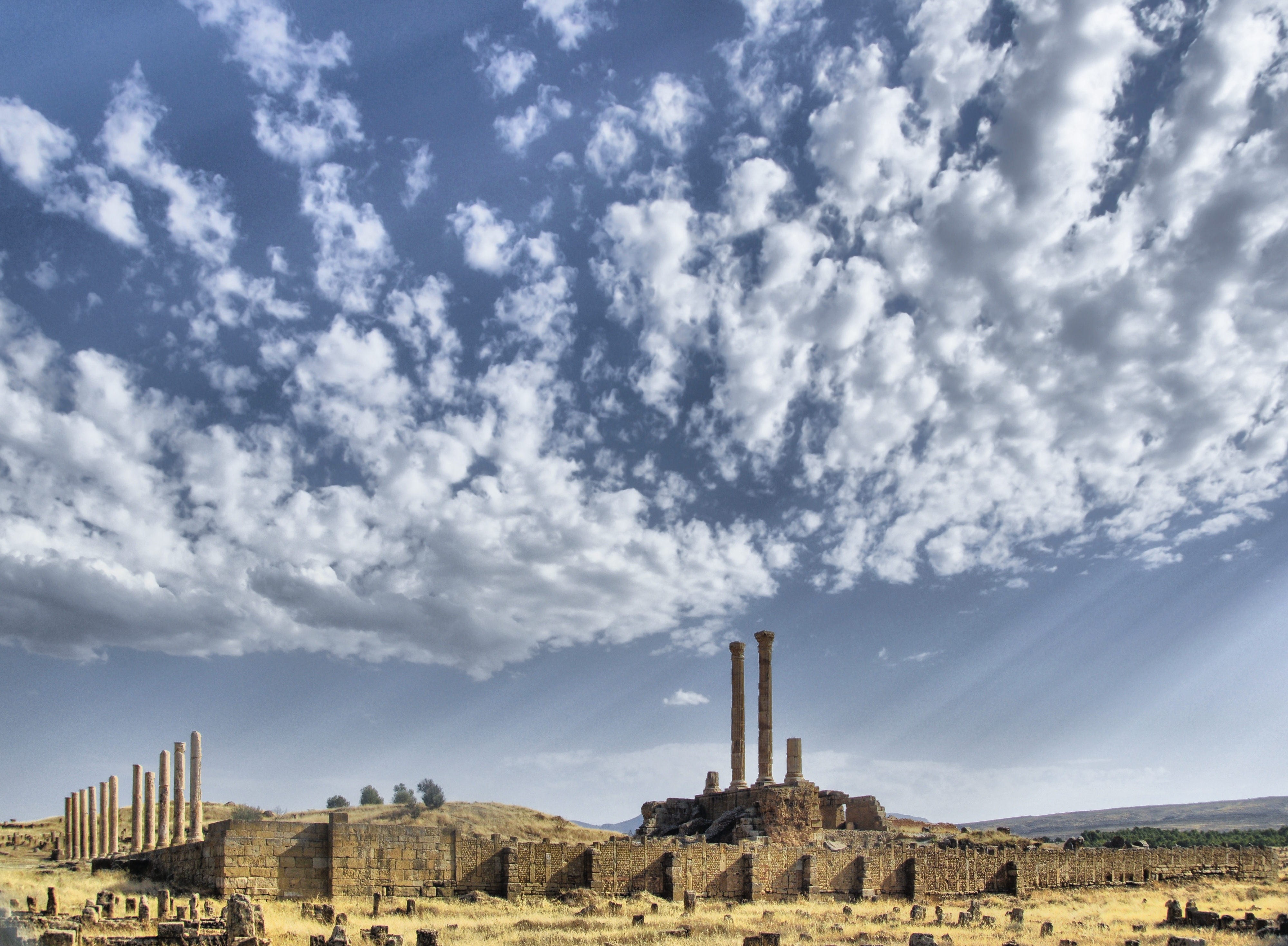 Territoires et monuments de l'antique Thamugadi.